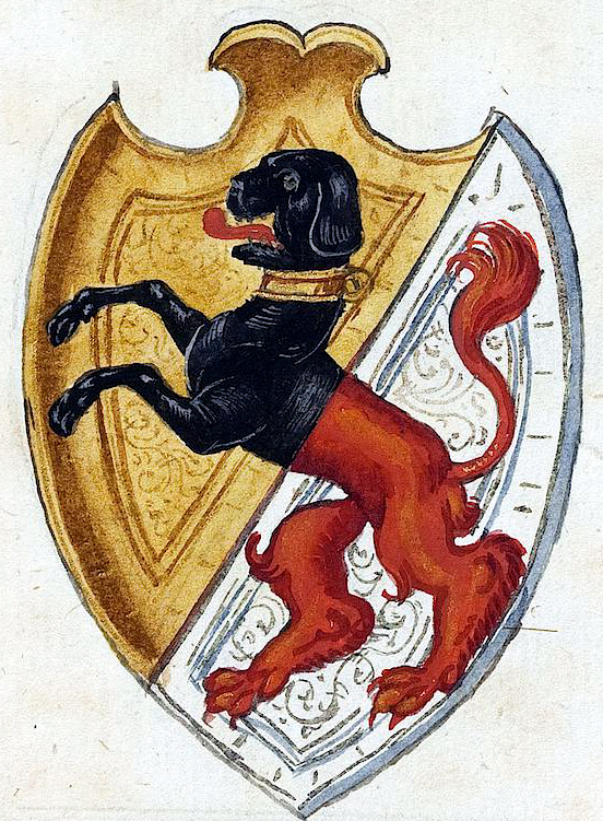 Genannte des Großen Rats Nürnberg (UB Tübingen Md 51), Bl. 10r, Wappen Bartholme Viatis